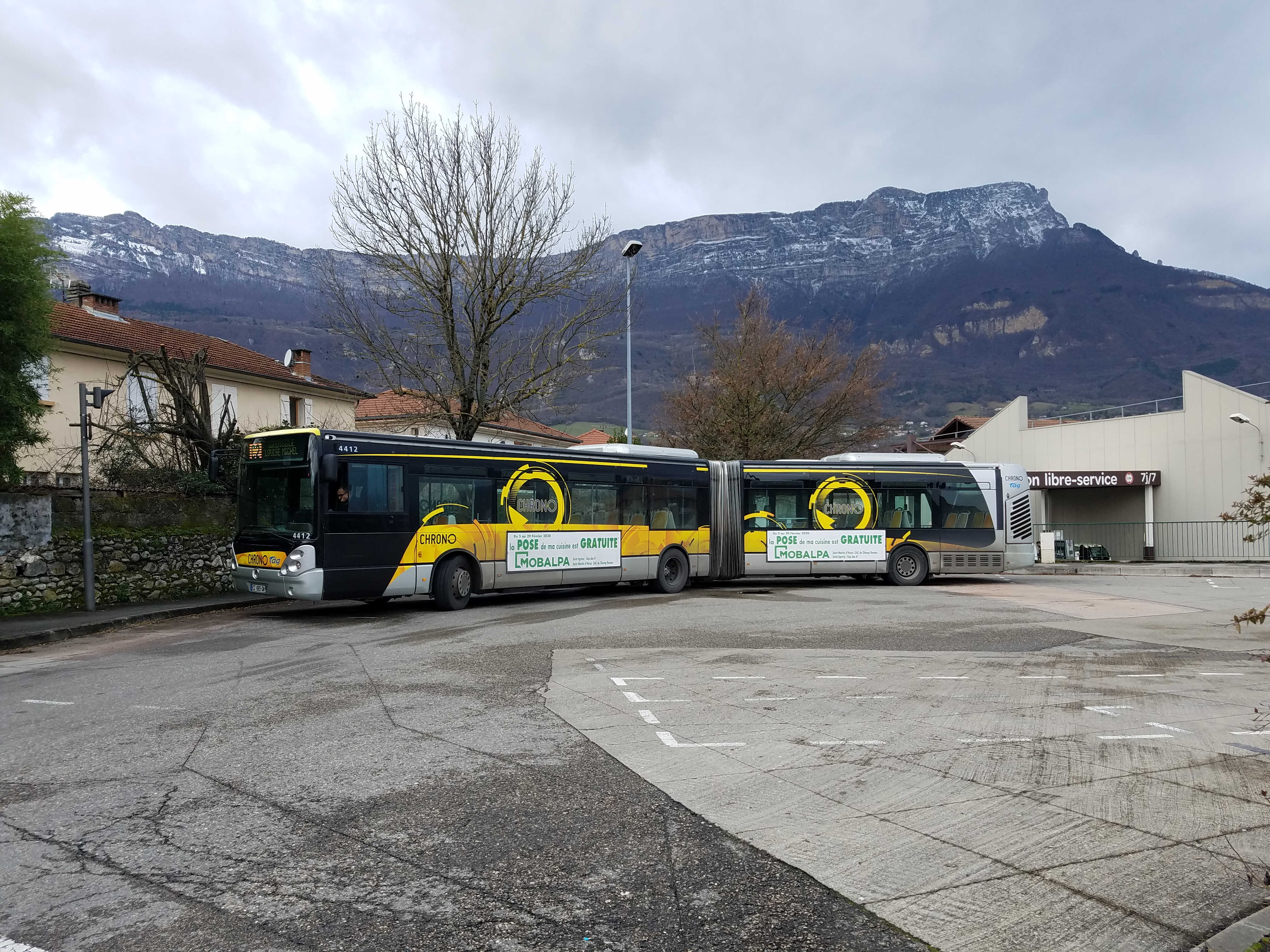 Citelis 18 Chrono de la ligne C2, régule à Claix Pont-Rouge